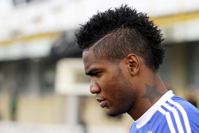 Браун Ідеє - нігерійський футболіст під час виступів за Динамо на фіналі Кубку України